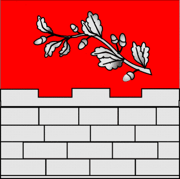 baron préfet